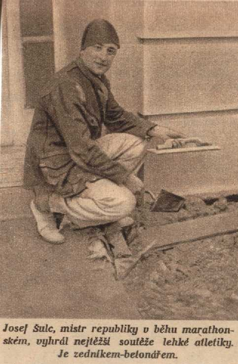 Josef Šulc, československý atlet, běžec